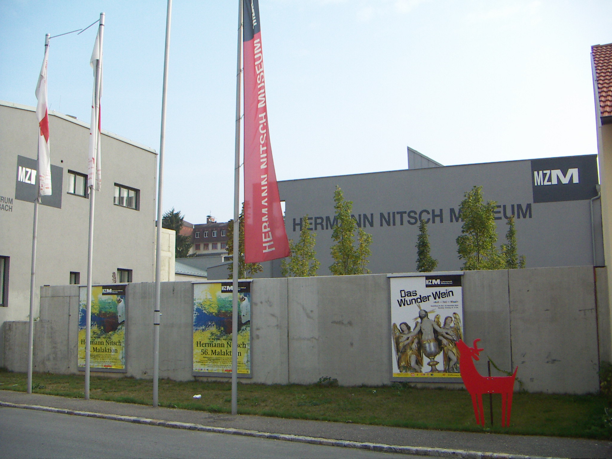 Museumszentrum Mistelbach, Front Hermann Nitsch Museum